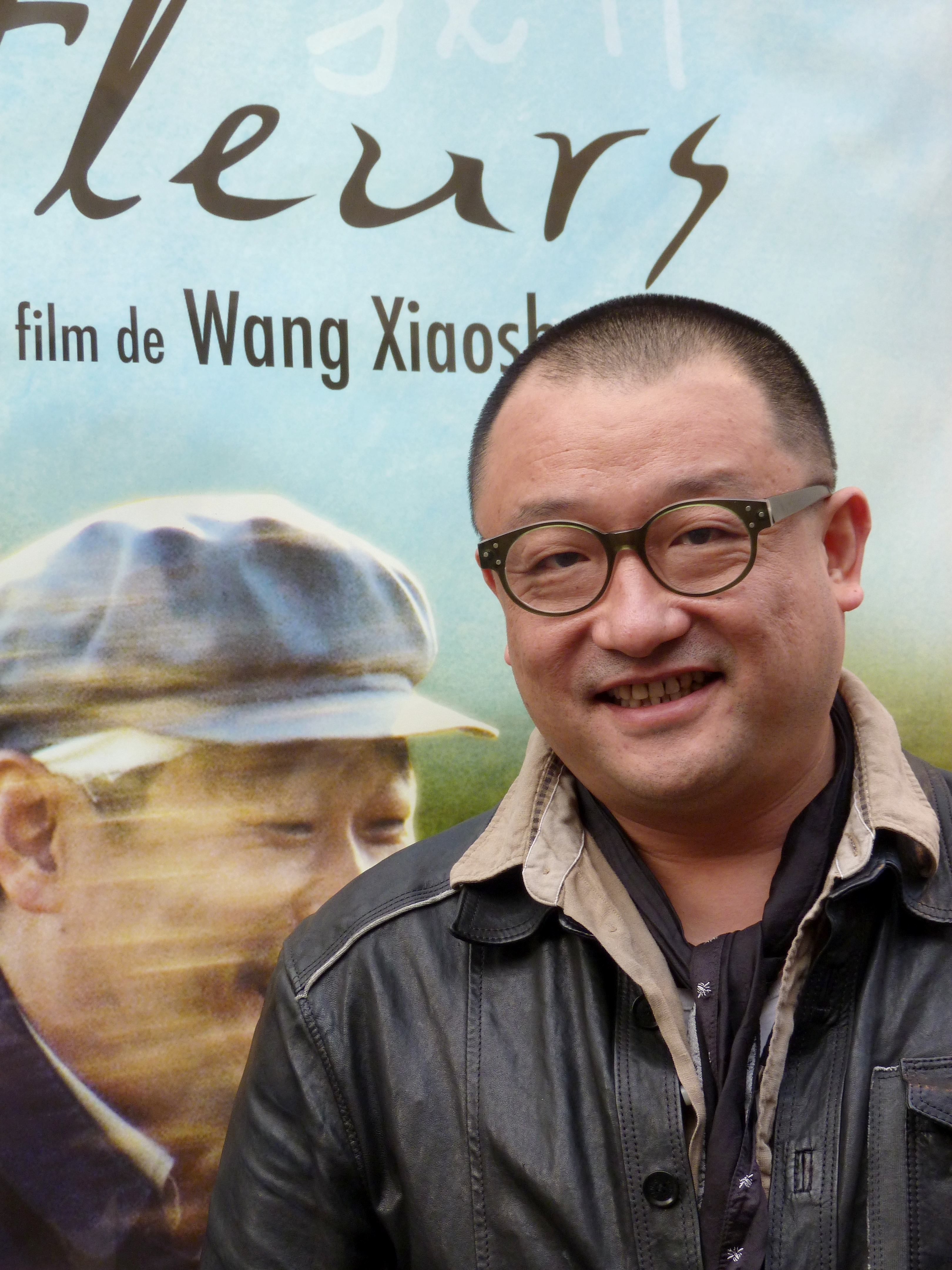 Le réalisateur chinois Wang Xiaoshuai, lors de la présentation en avant-première de son film 11 Fleurs au cinéma Nouvel Odéon (Paris, 6e arrond.), le 24 avril 2012.